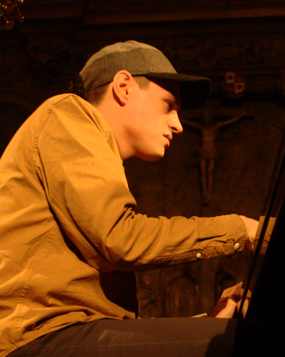 Lorenz Kellhuber bei einem Konzert mit seinem Trio in der Stadtkirche Darmstadt am 23.01.2016